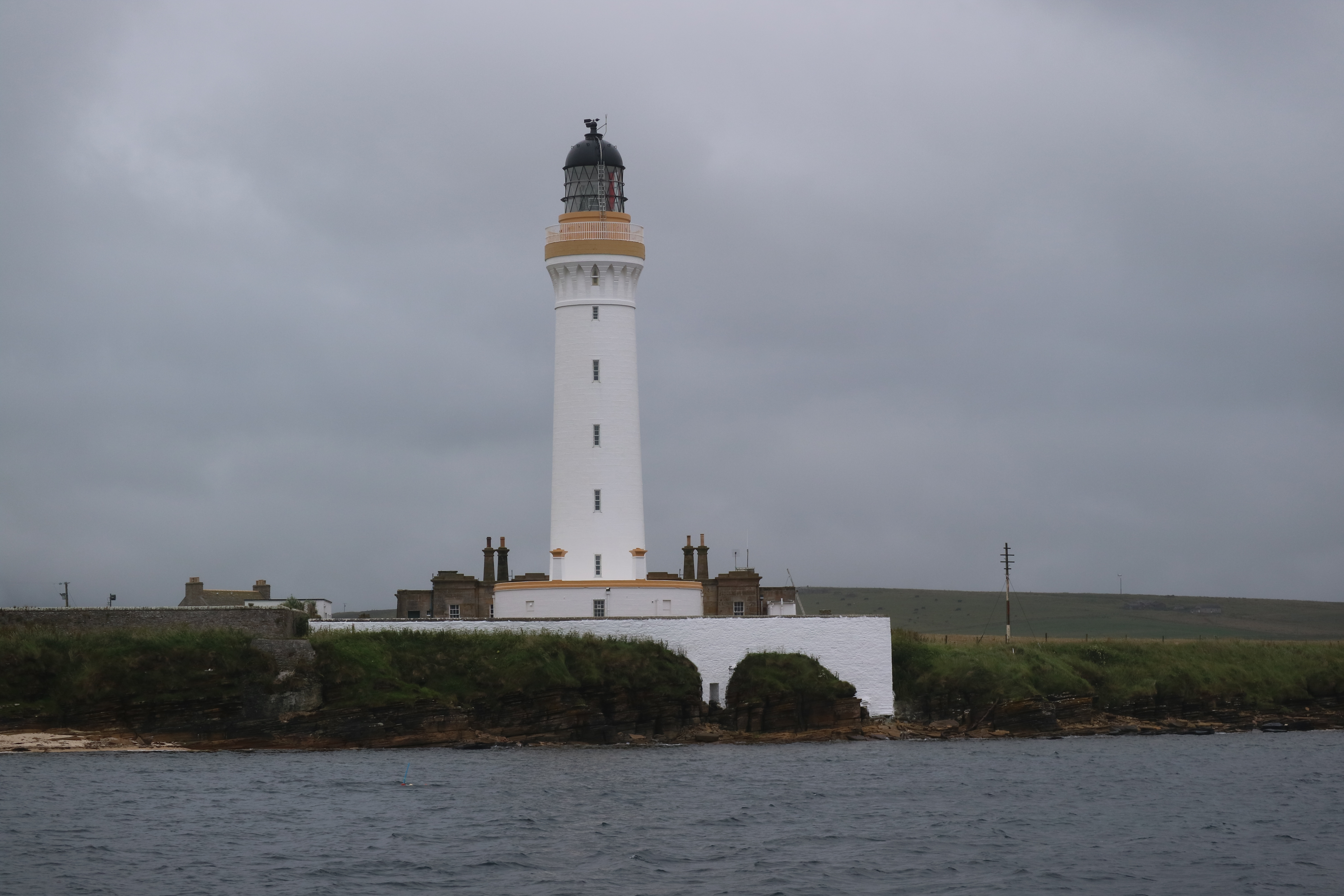 Hoy Sound High Lighthouse auf Gramsay, Orkneys